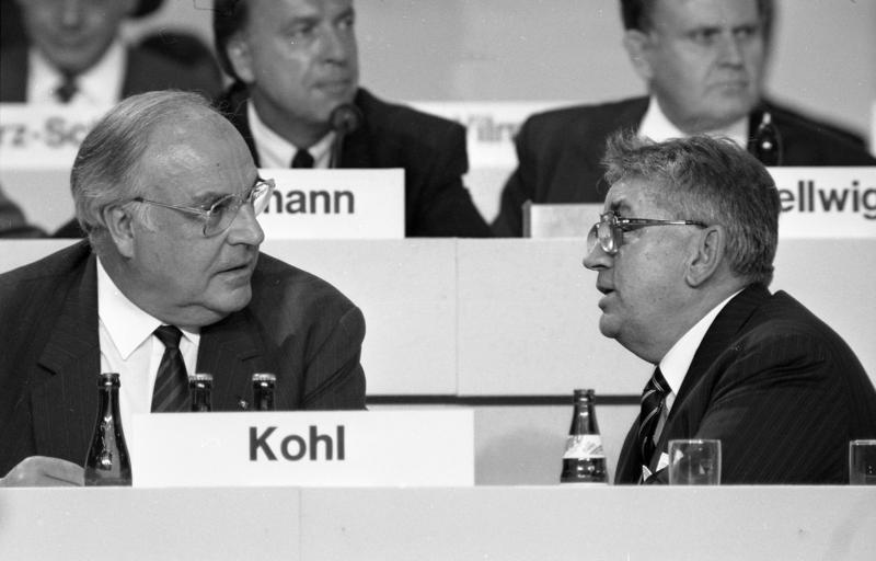 11.-13.9.1989 37. Bundesparteitag der CDU in der Bremer Stadthalle